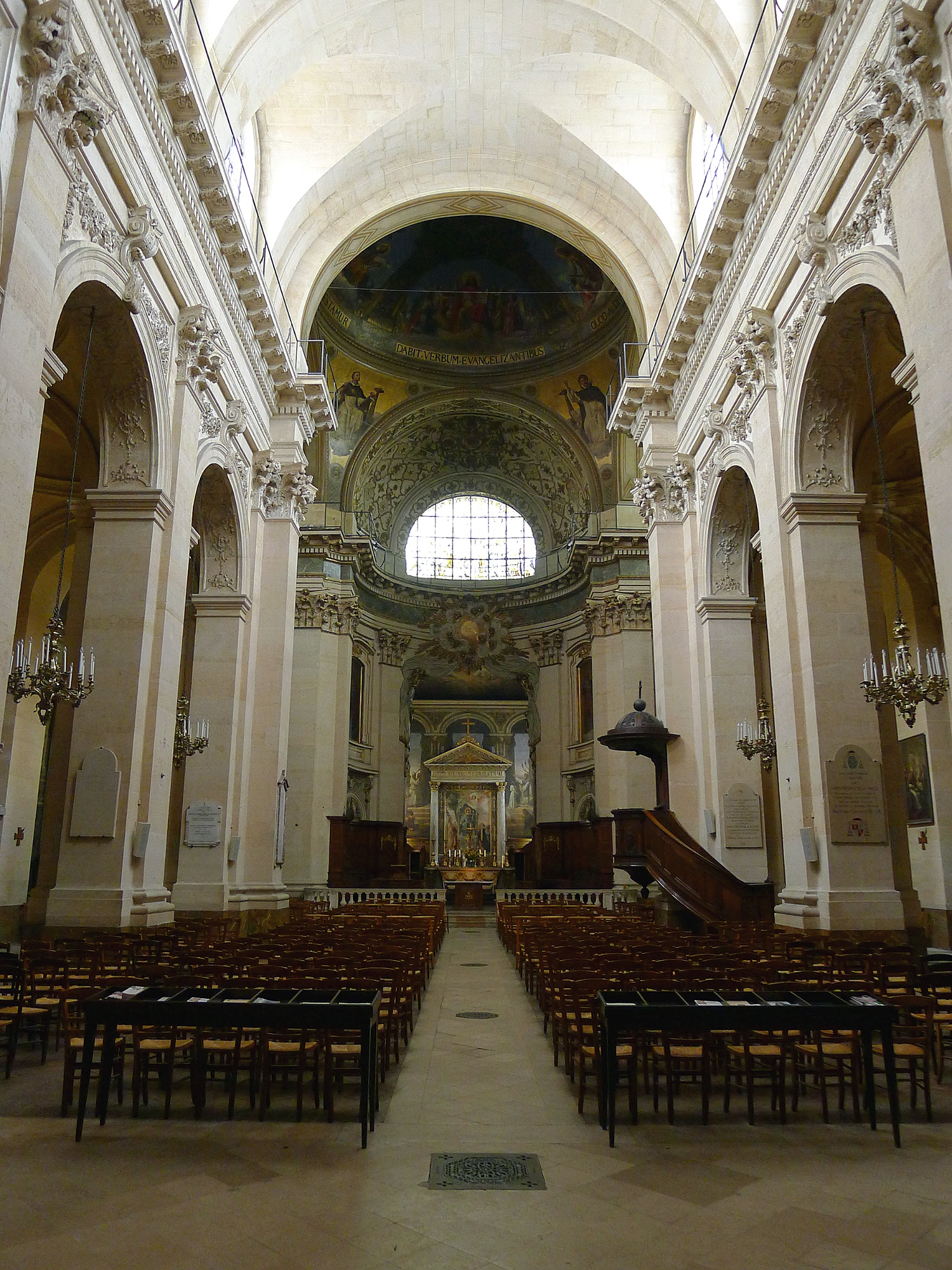 Église Saint-Thomas-d'Aquin (nef) - Paris VII